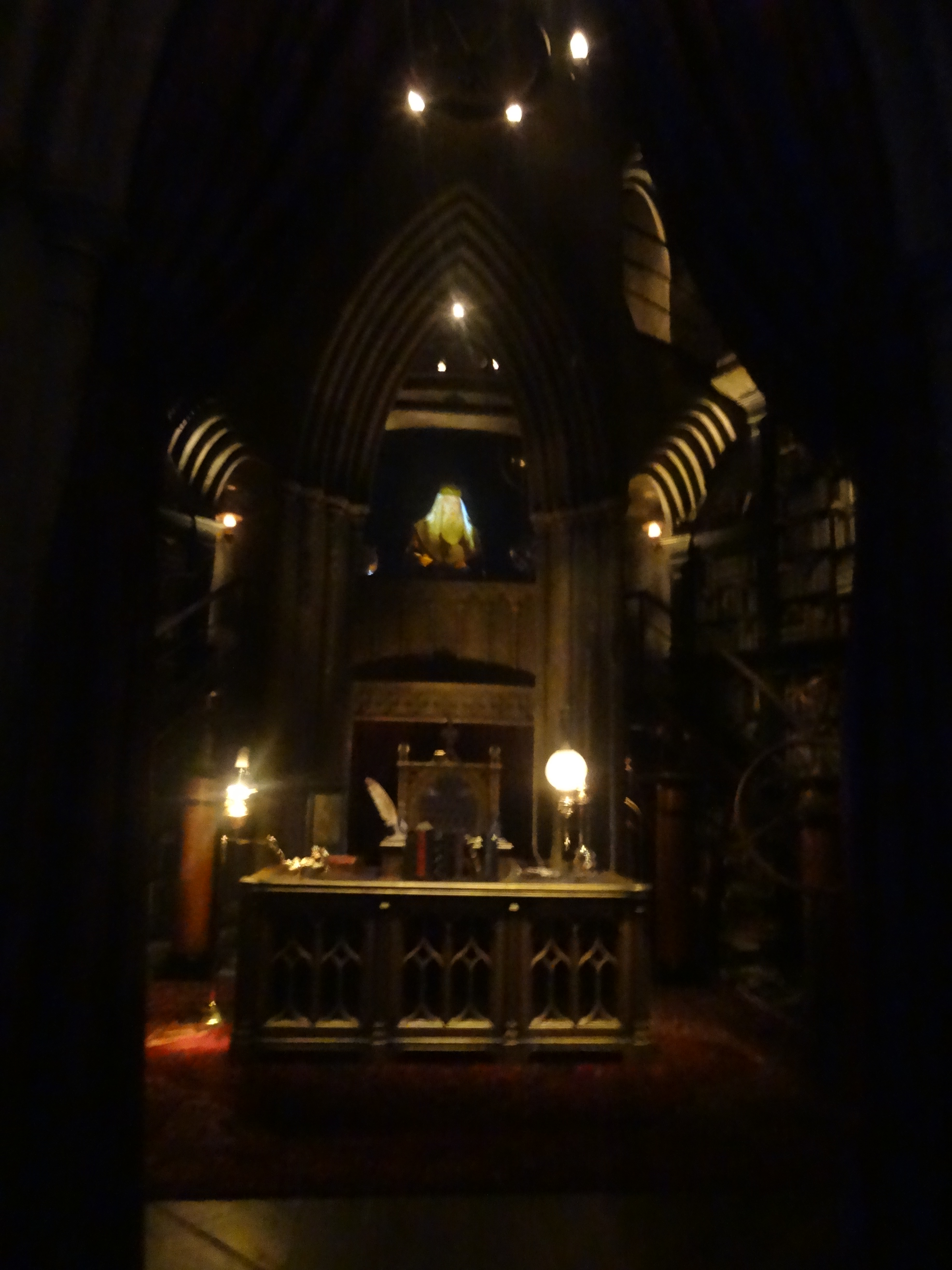 Bureau de Dumbledore à Universal Studios Japan